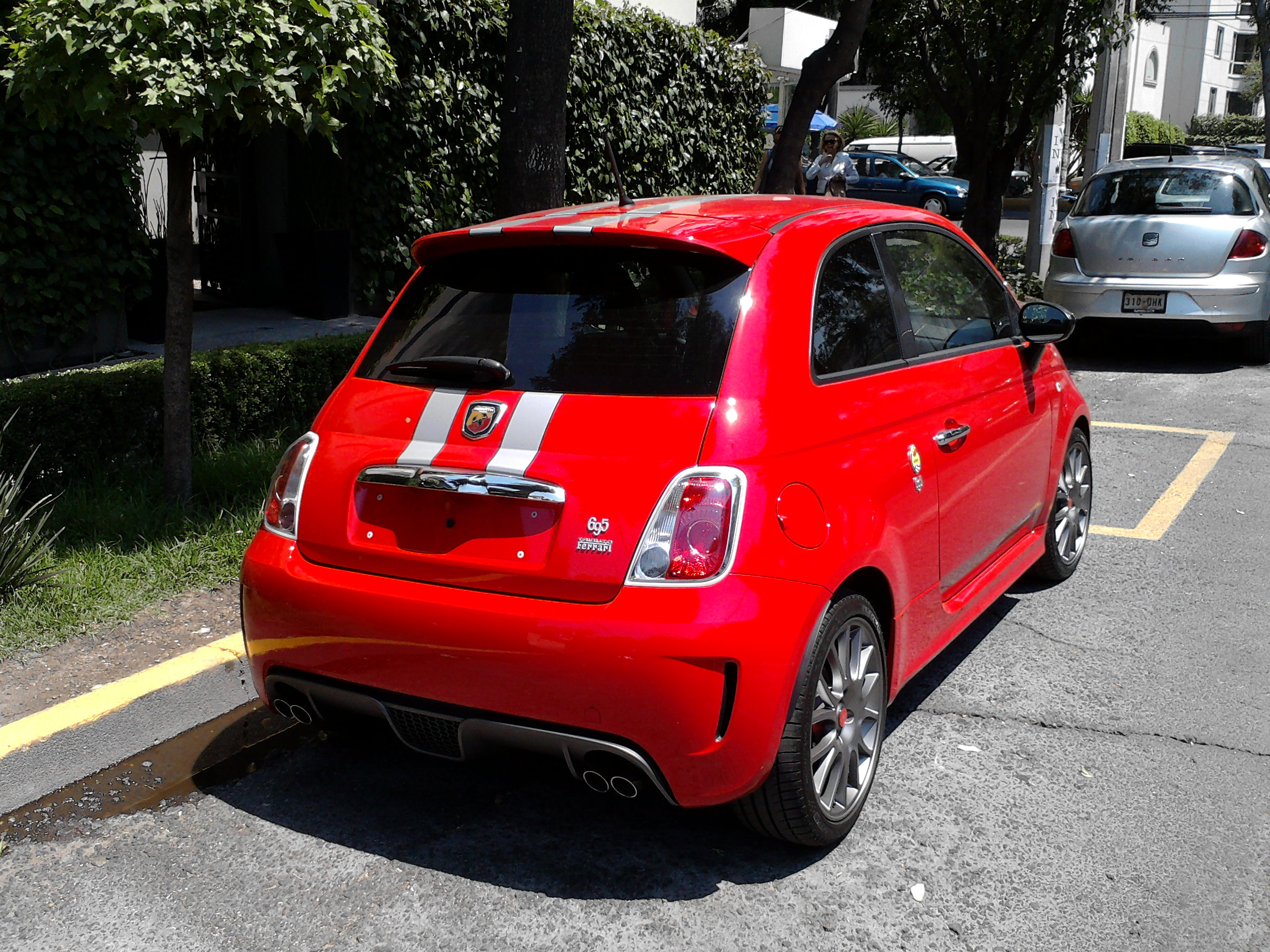 Esta foto se tomo con una LG GM360 en la Ciudad de Mexico